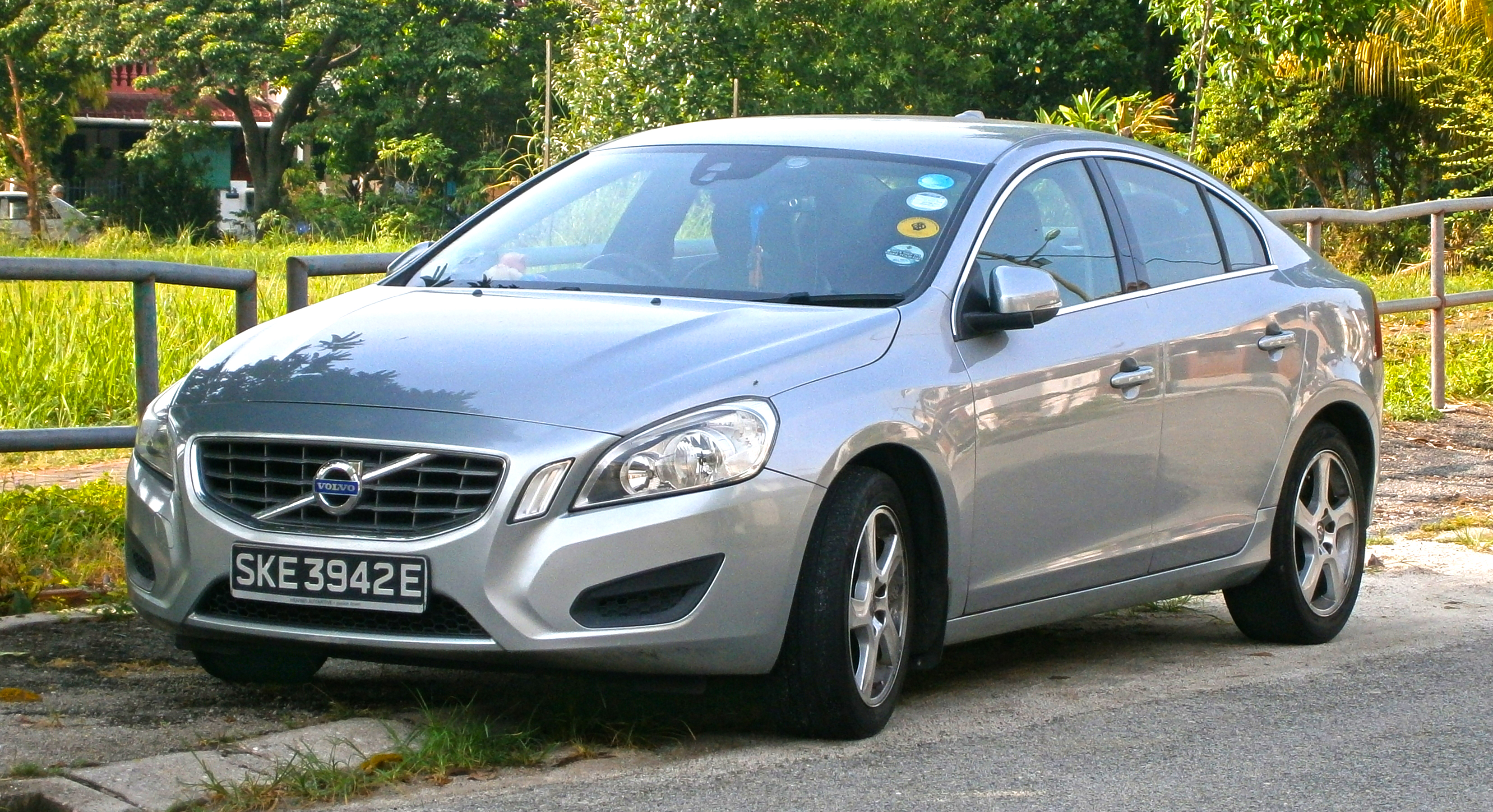 2011 Volvo S60 T4 4-door sedan